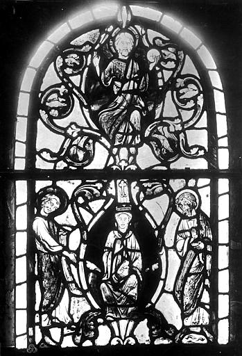 Verrières